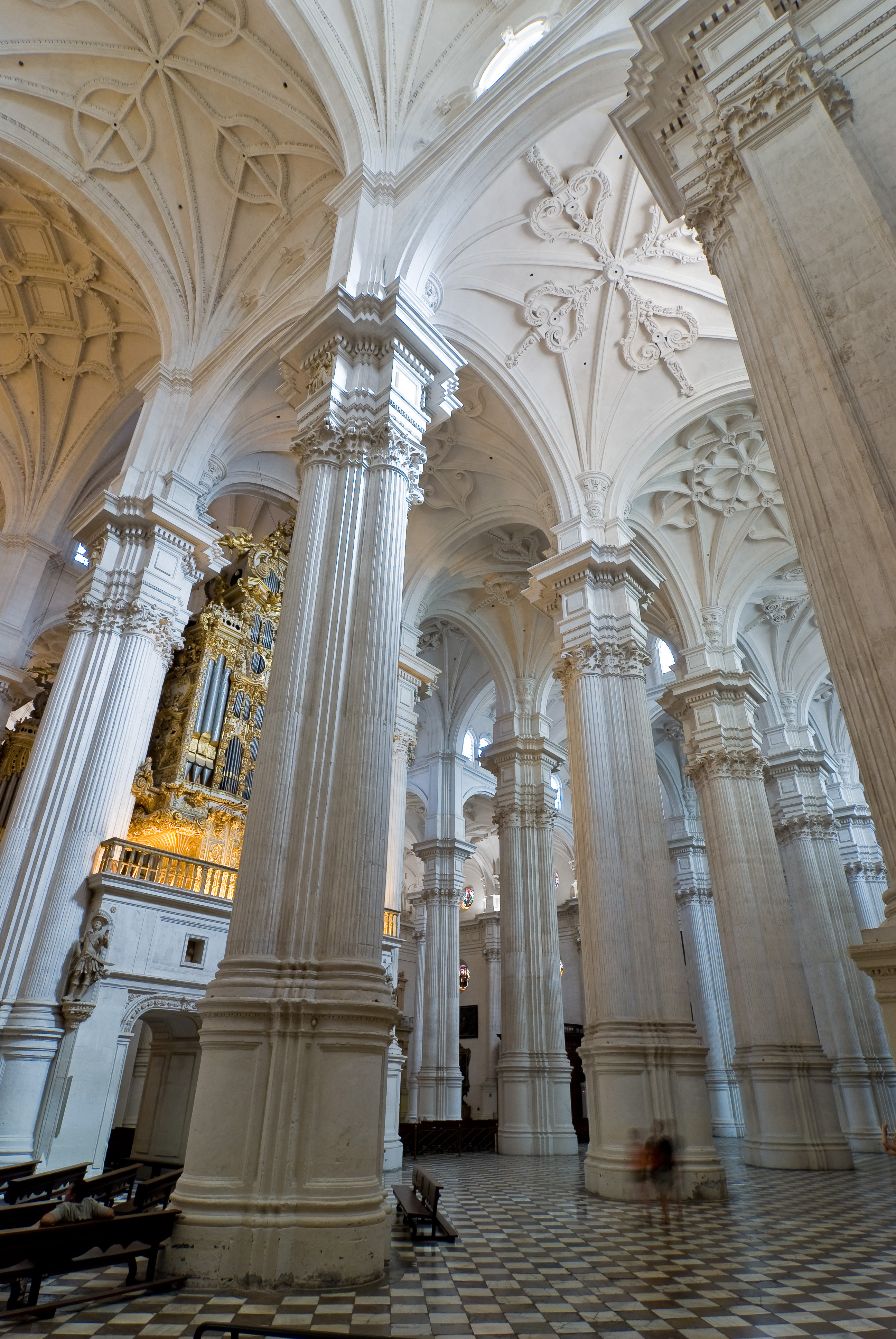 Vue de la nef et des bas-côtés (Cathédrale de l'Incarnation, Grenade, Espagne)